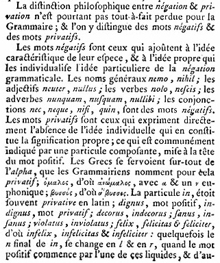 Extrait de l'article de Nicolas Beauzée sur la négation